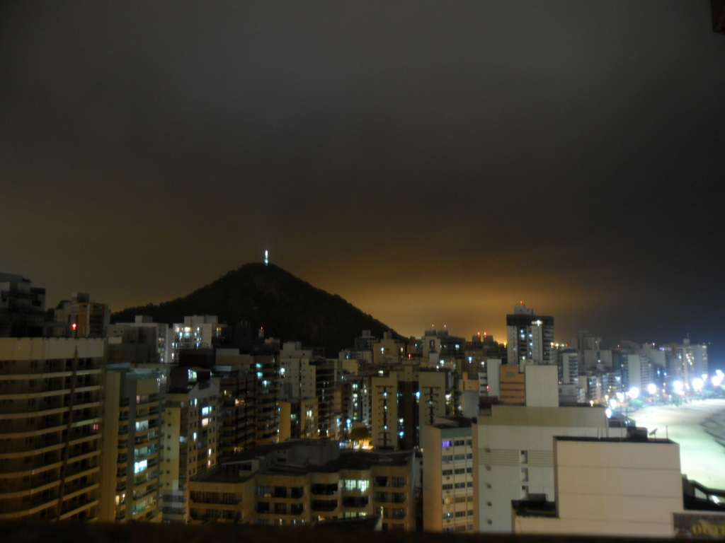 Vista do Quality Suites Hotel